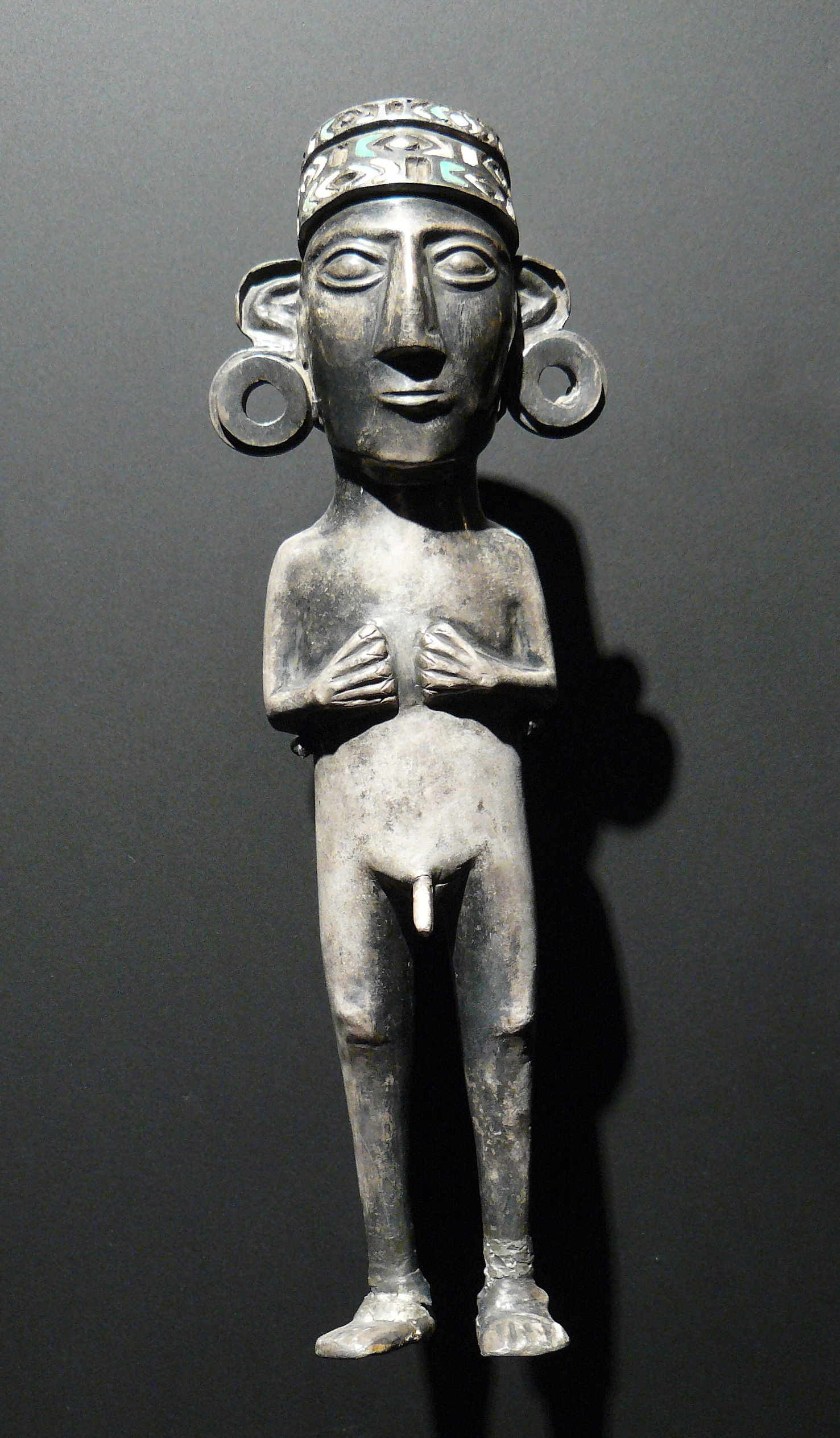 Figurine masculine - Pérou, plaine du sud - 1450/1532 - argent et incrustation de pâte de verre, env. 15 cm - Musée du quai Branly - Paris - n° d'inventaire : 71-1887-130-2